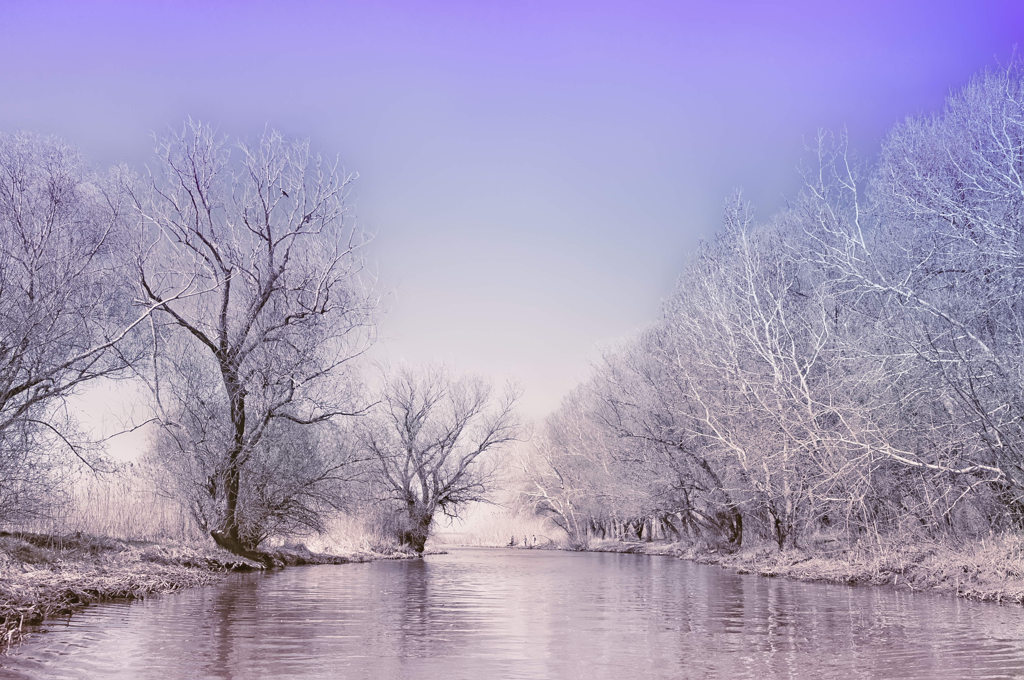 Нижньодністровський, Білгород-Дністровський, Біляївський та Овідіопольський райони